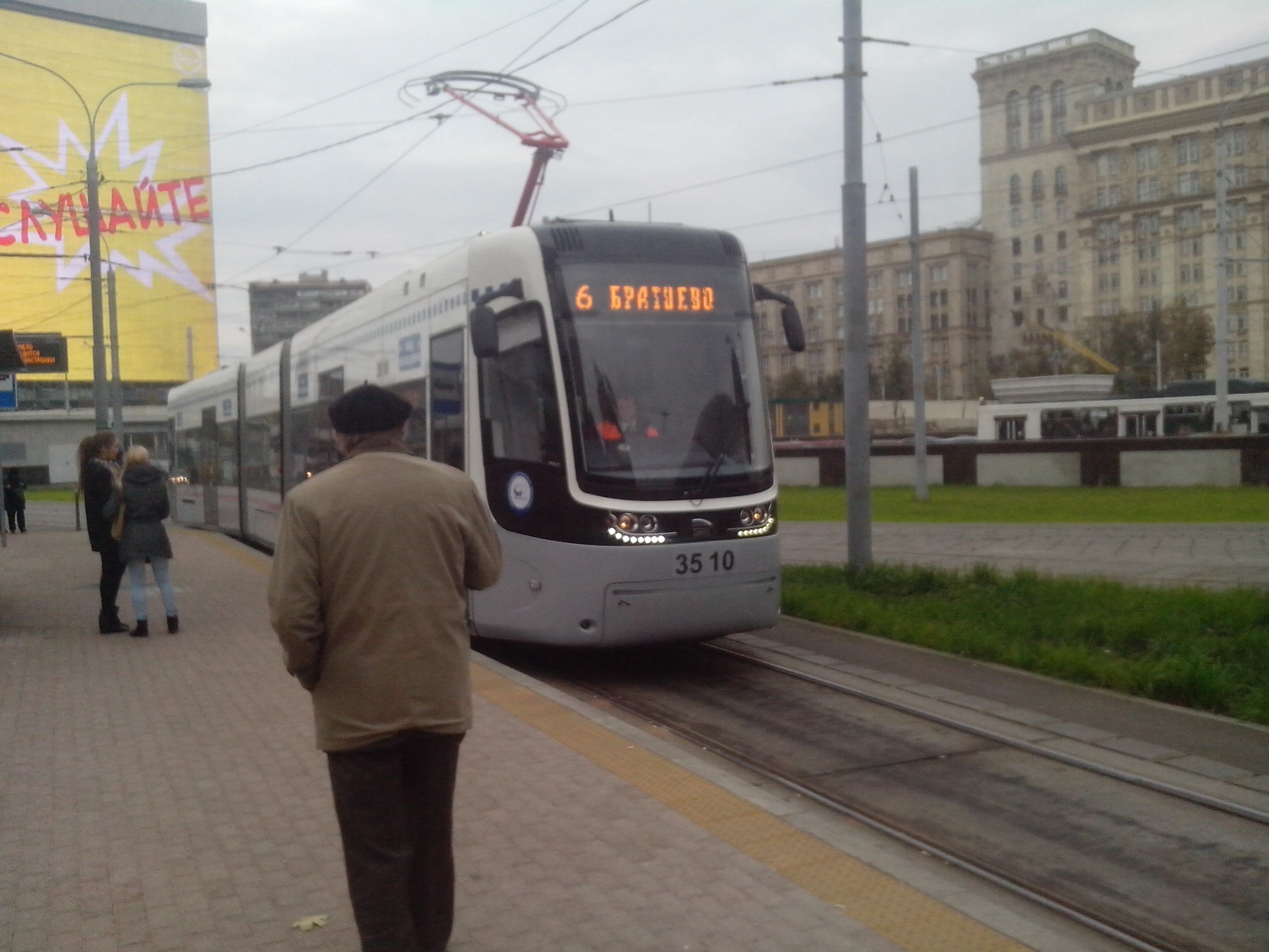 Трамвай 6 на Соколе